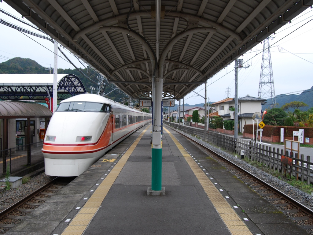 東武鉄道鬼怒川線小佐越駅ホーム全景（2008/10/26撮影）